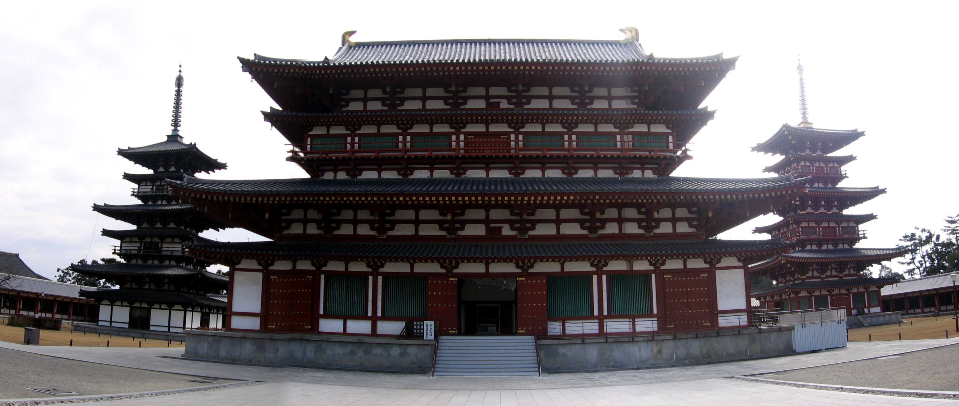 Yakushiji temple, Nara, 01/2006 by Peter 111